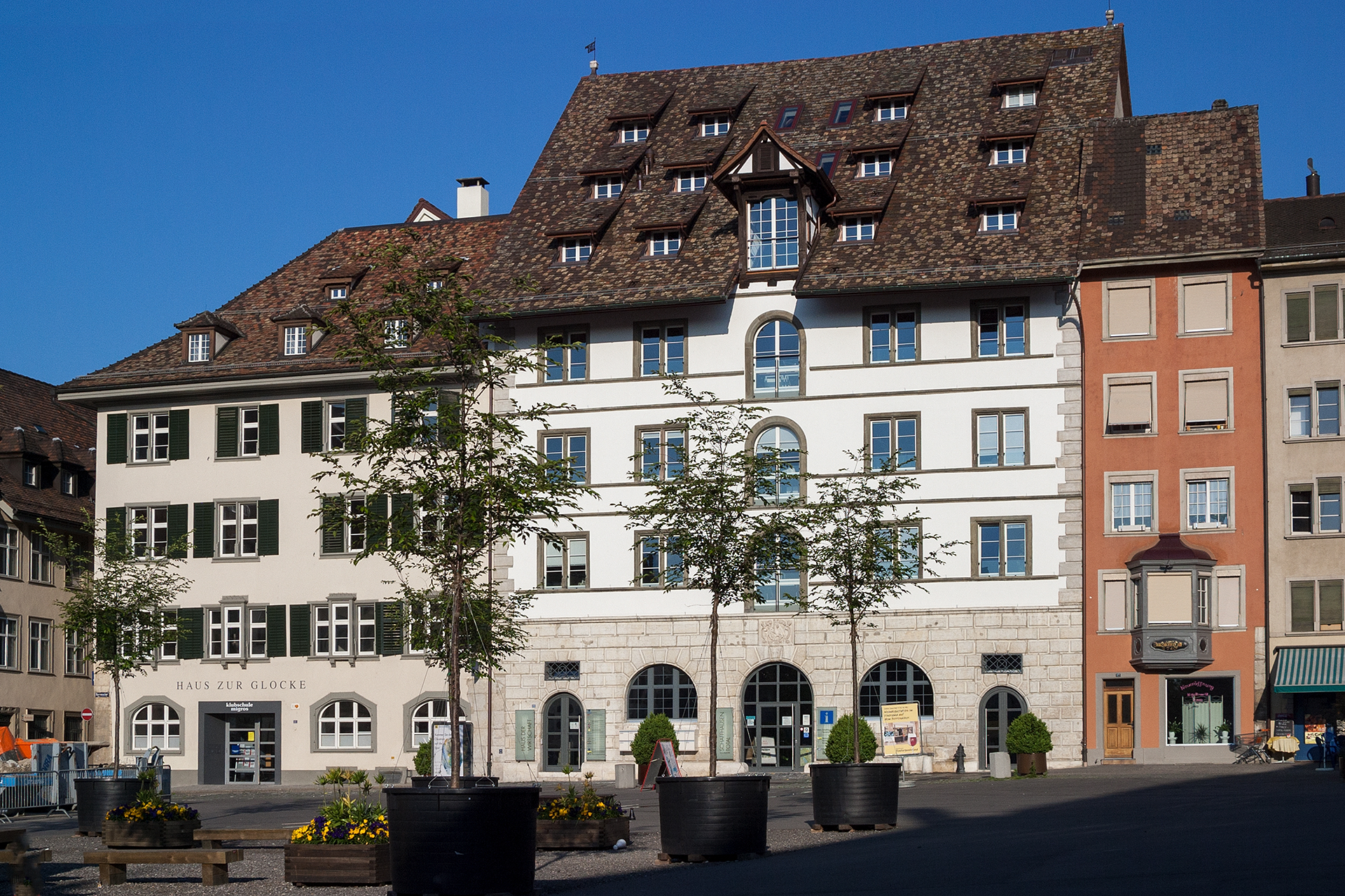 Herrenacker in Schaffhausen